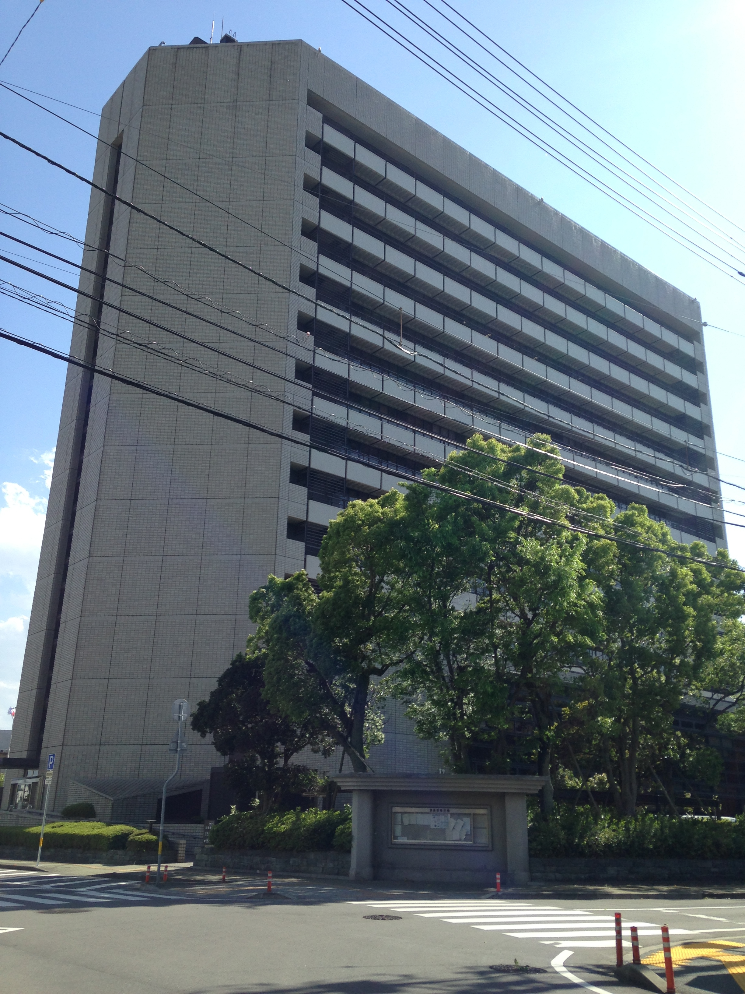 徳島市役所